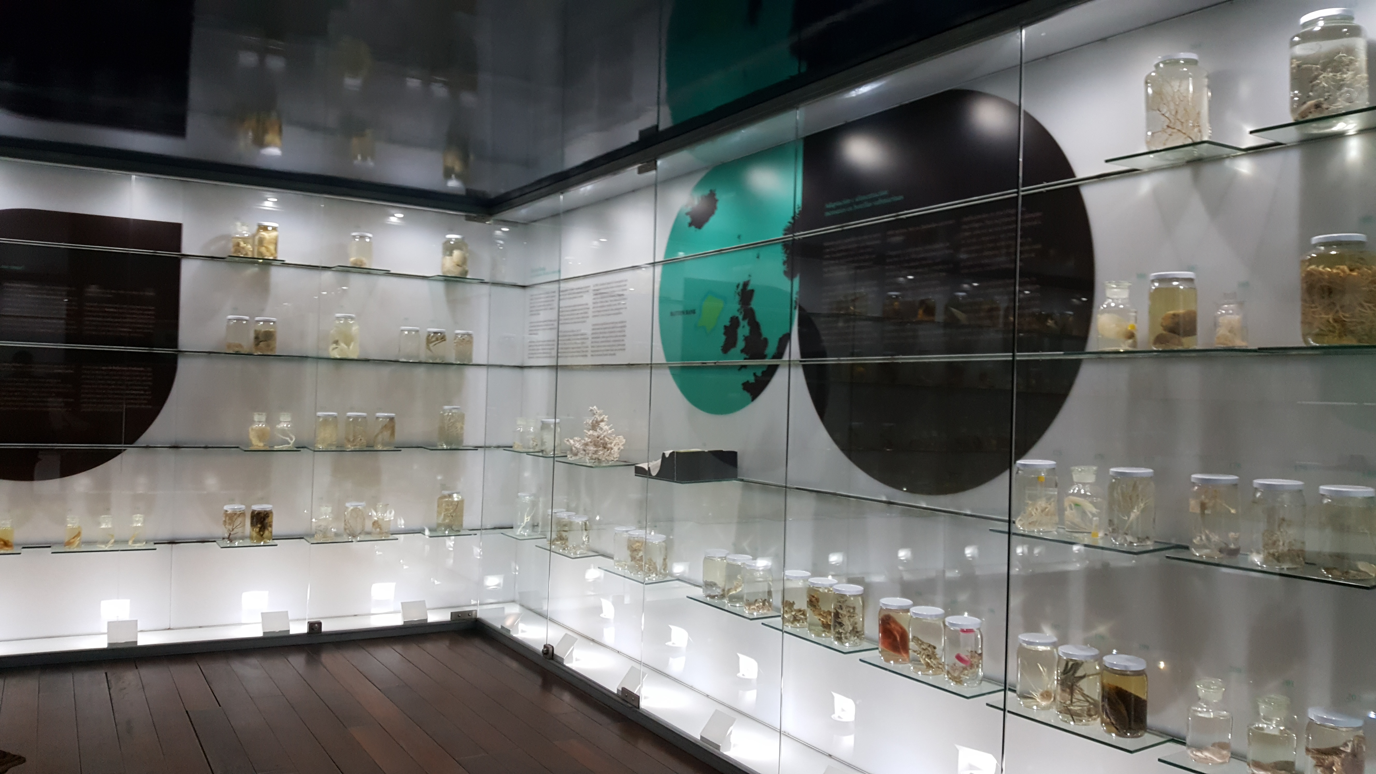 Neses frascos pódese ver a diferente fisionomía que presentan os habitantes dos mares segundo a profundidade das augas nas que habitan.